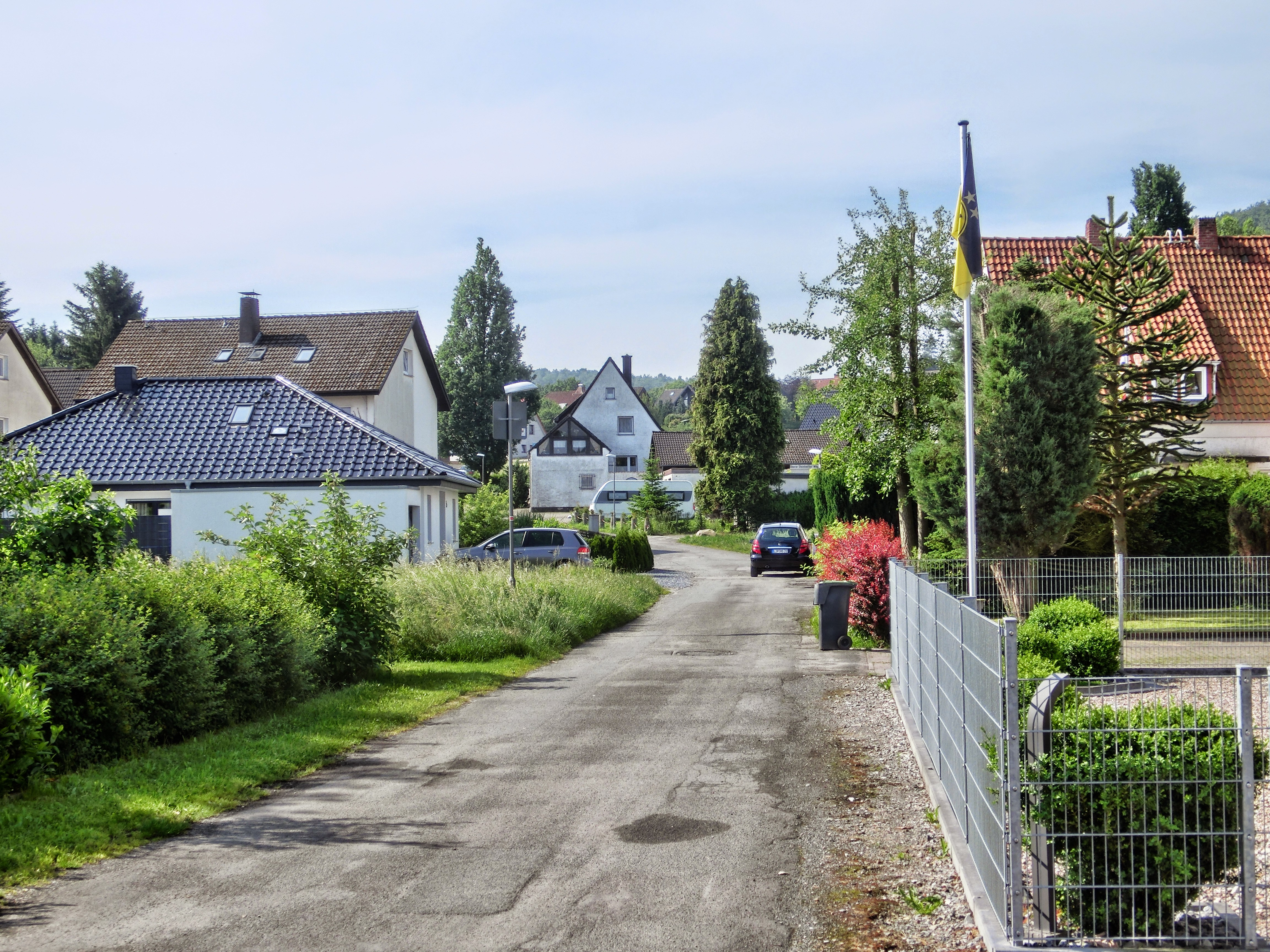 Deutschland (D) - Nordrhein-Westfalen (NW) - Kreis Lippe (LIP) - Bad Salzuflen - Wüsten: Steinweg, Blick Richtung 'Oberer Steinbecker Weg'